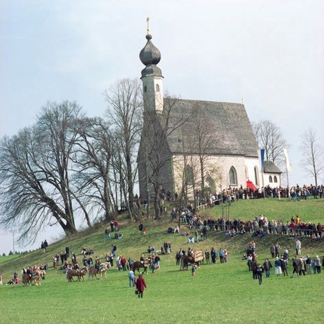 Brauchtum in Bayern (Deutschland). Georgiritt Traunstein